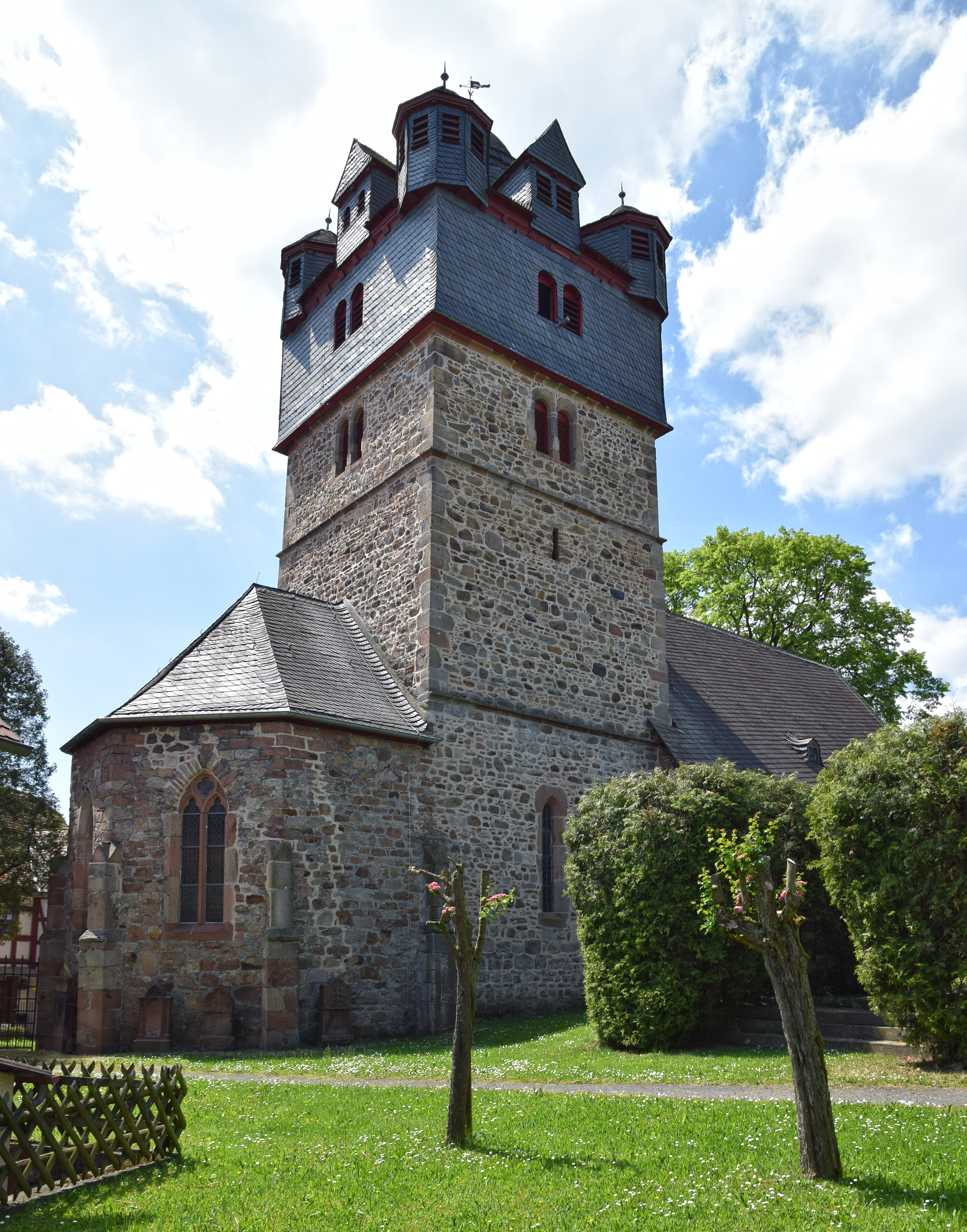 Turm der evangelischen Kirche in Fronhausen